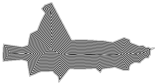 Description: Front enflammé pour la recherche du squelette dans une forme. Source: François Sarradin Licence: 2005, François Sarradin